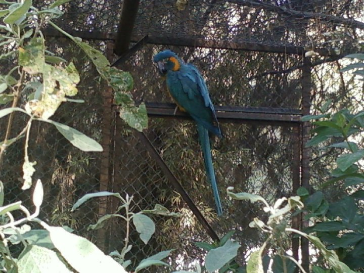 guacamaya azul adaptada al cautiverio, en el aviario el nido de Ixtapaluca.